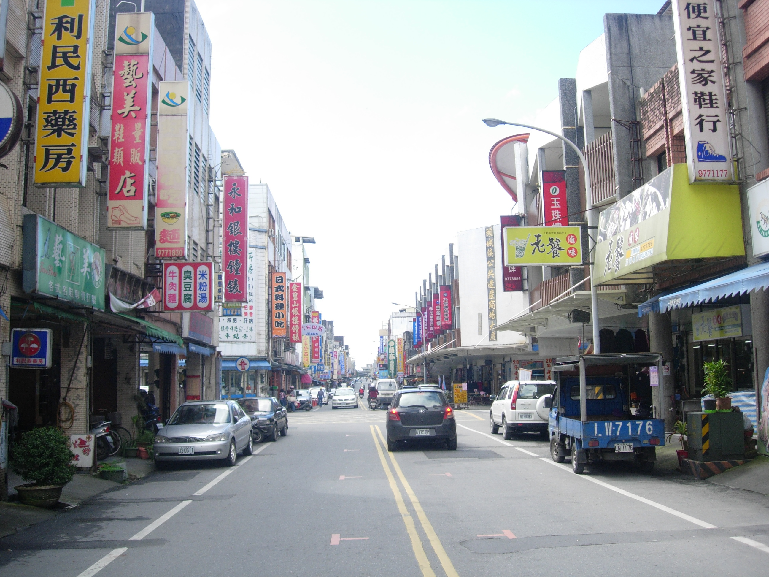 中文（台灣）: 頭城開蘭路街道商家林立